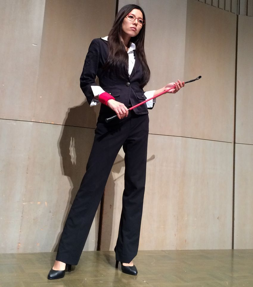 我闘雲舞にて